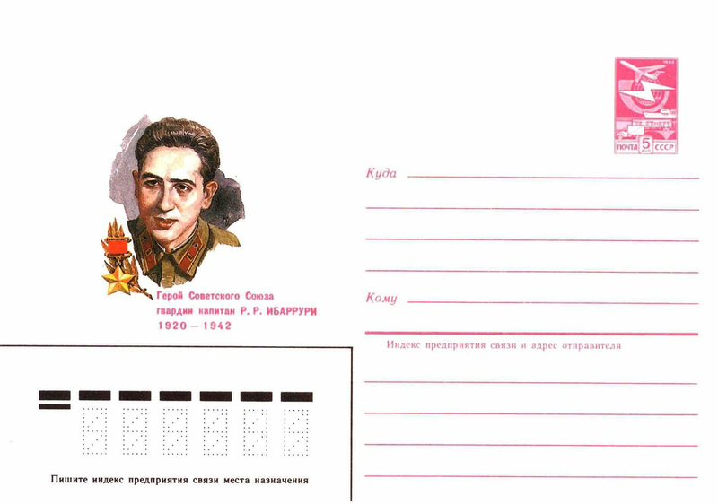 Художественные маркированные конверты 1984 года.